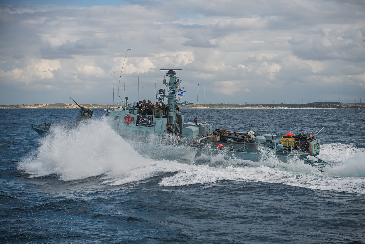 דבורה בסיור כנגד ים גלי